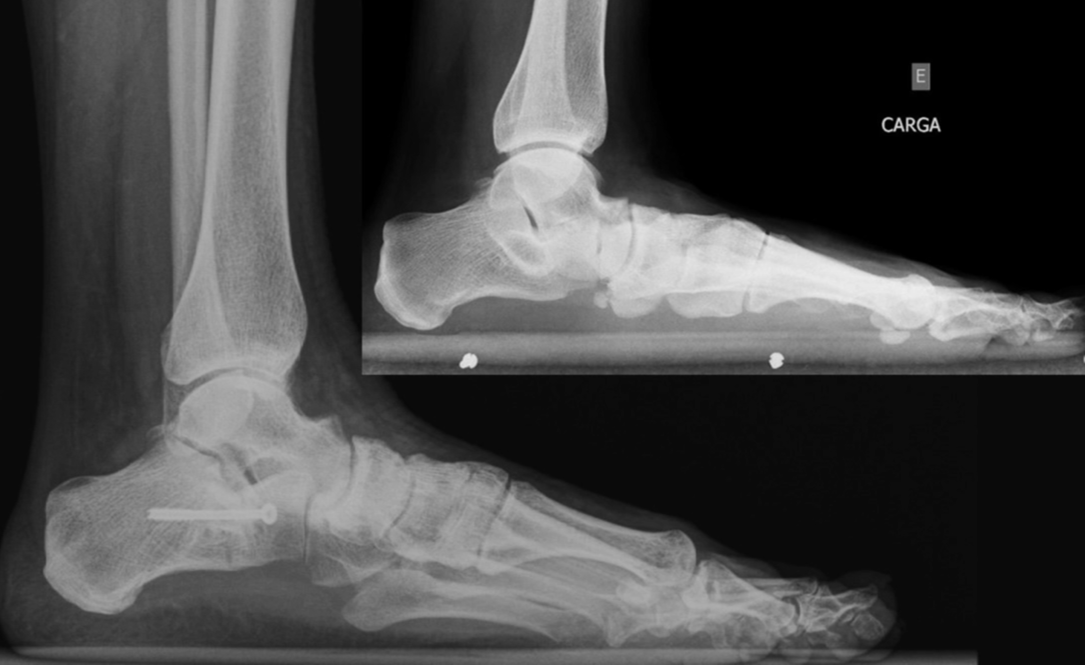 Radiografía de perfil resultado final